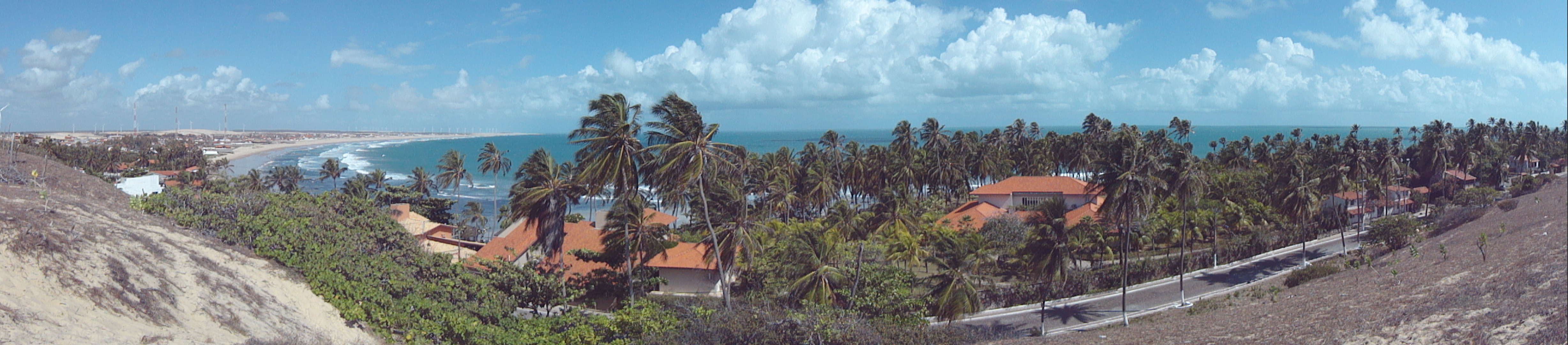 Vista Panorâmica da Praia de Taíba